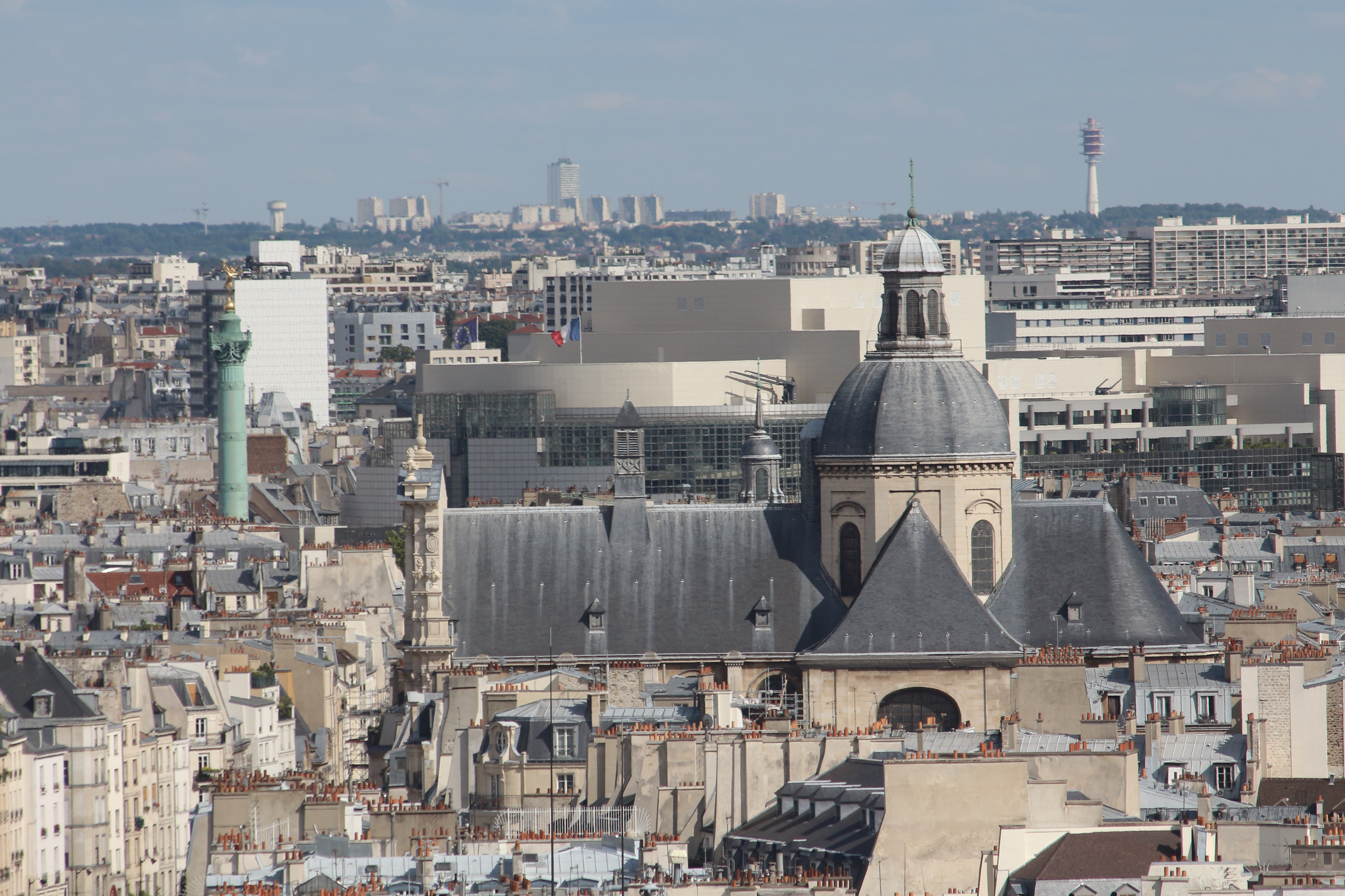 L'église Saint-Paul-Saint-Louis vue depuis le sommet de la tour Saint-Jacques,avec la colonne de Juillet et le sommet de l'Opéra Bastille